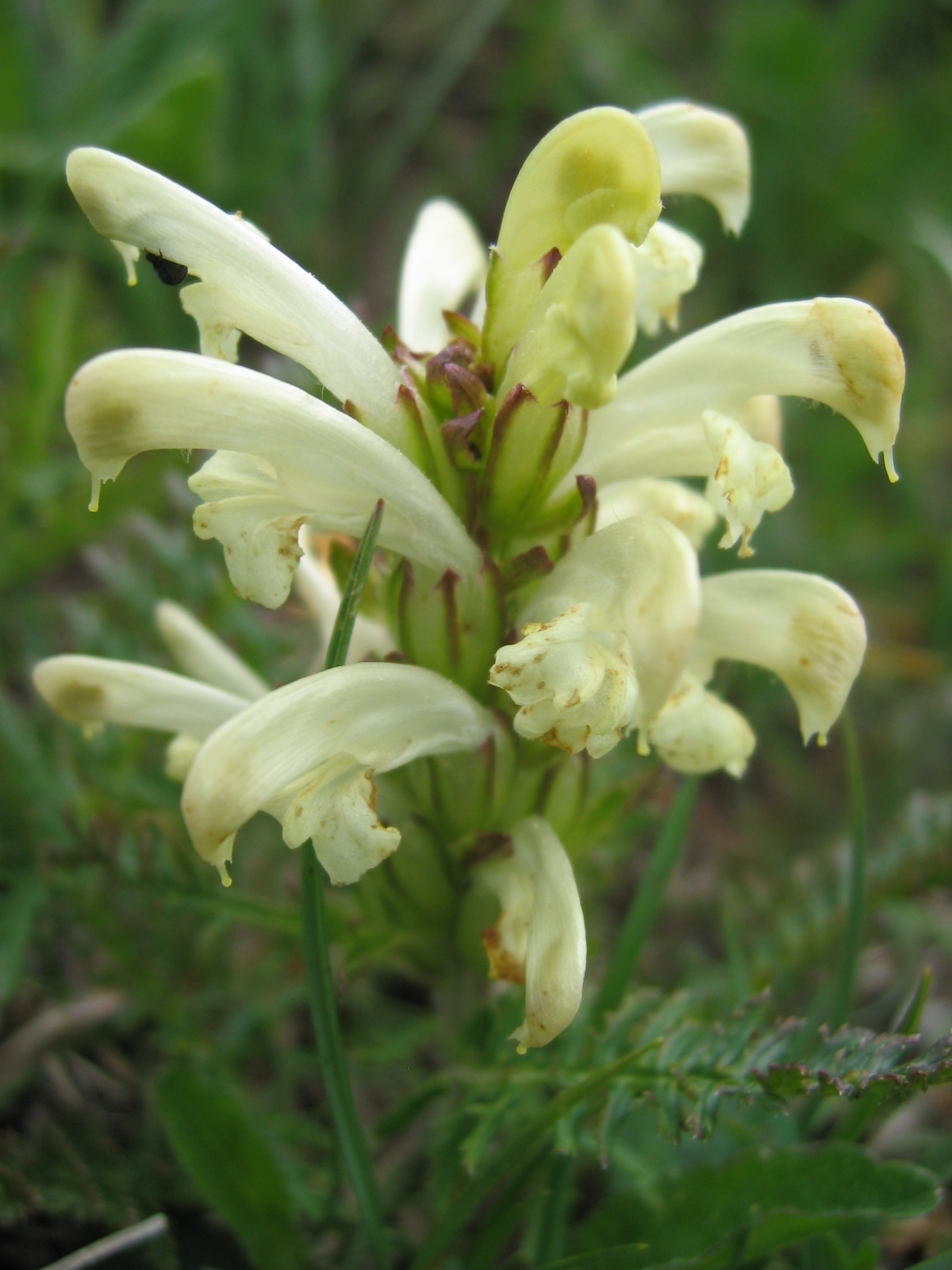 Pedicularis comosa : Bonnet de Calvin au dessus de Mens - (Trièves, France)